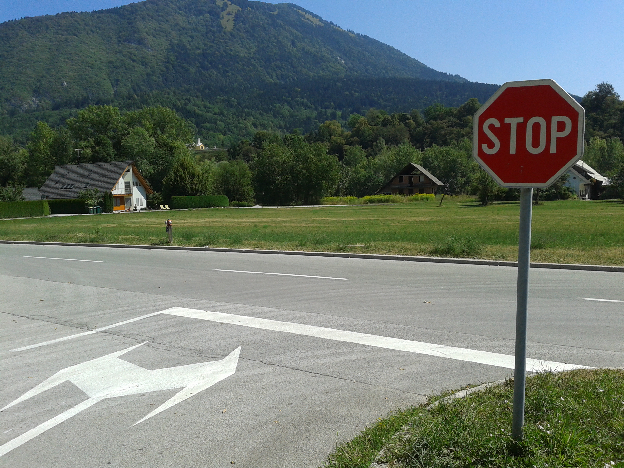 Loka pri Tržiču